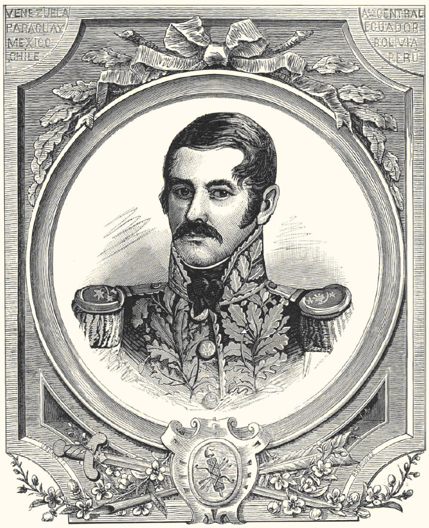 Dessin et gravure d'Alberto Urdaneta et d'Antonio Rodríguez, paru dans le périodique colombien "Papel Periódico Ilustrado" (1881-1887).